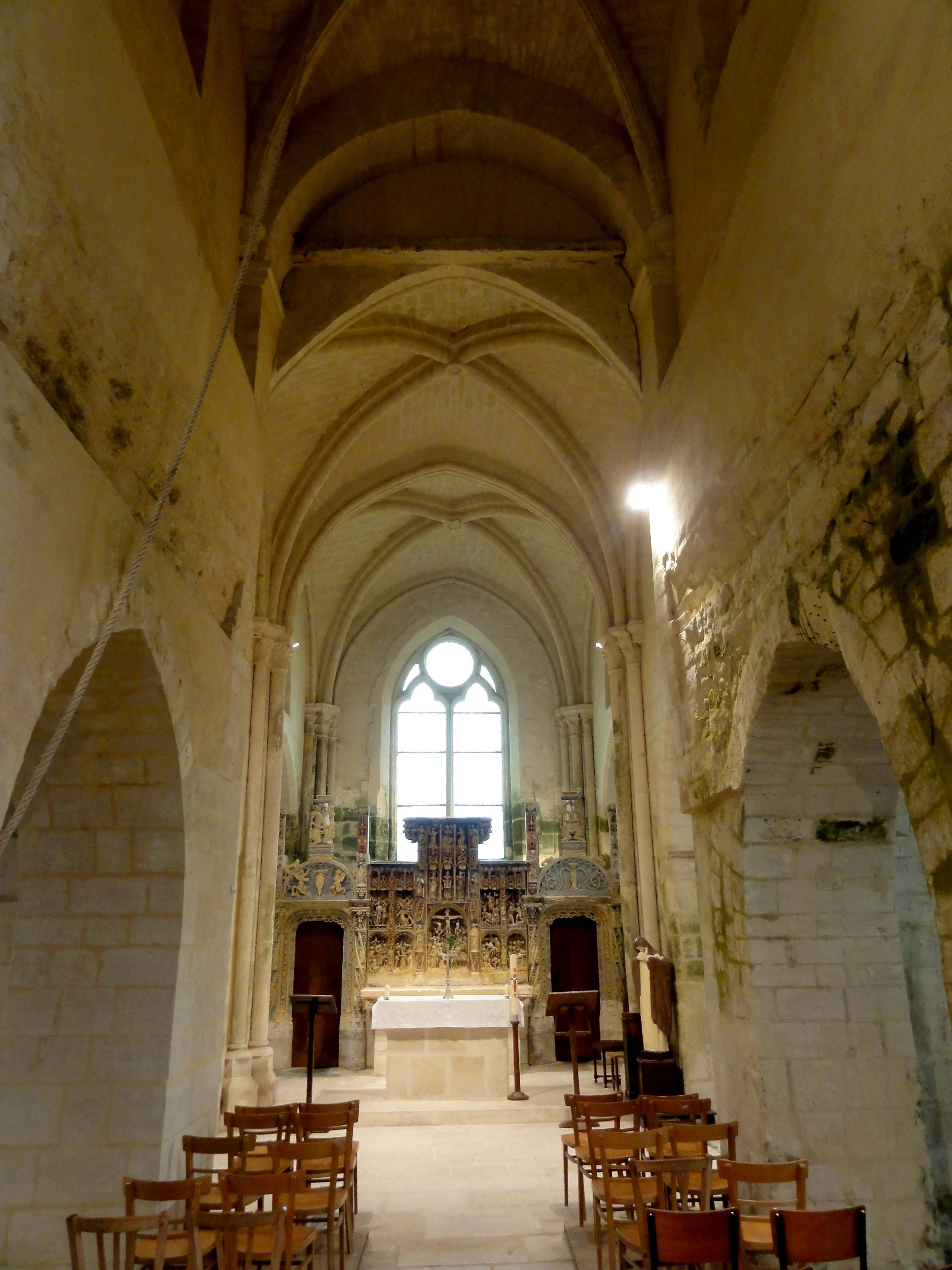 Intérieur de l'église - voir titre.